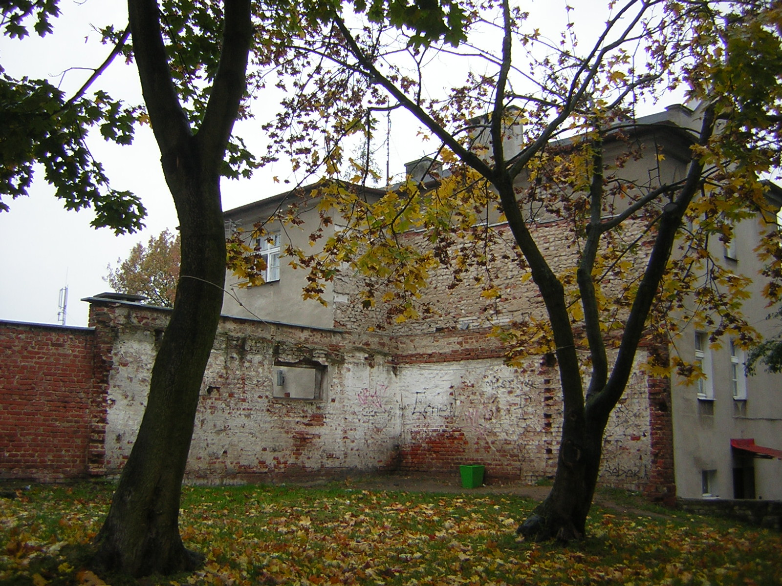 Pozostałości baszty w Iławie